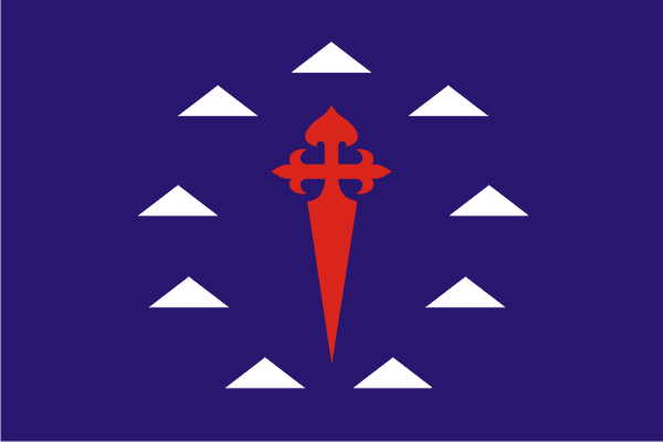 Bandera de Santiago del Teide (Tenerife)